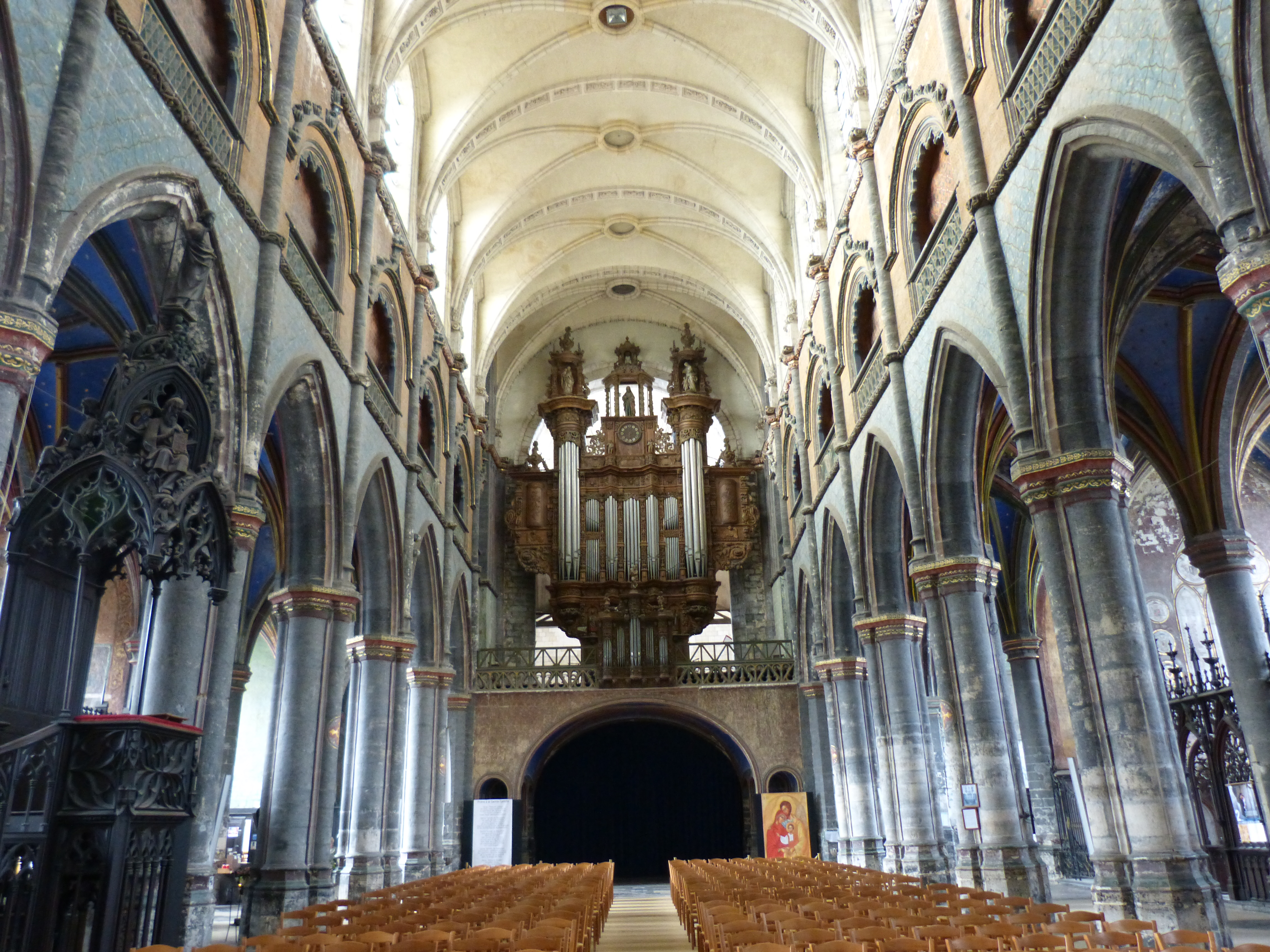 Vue de l'orgue et de la nef de la collégiale Saint-Pierre, depuis l'autel